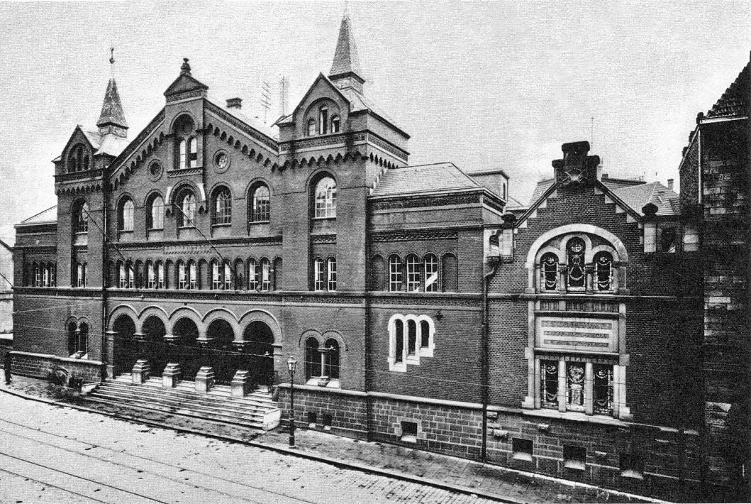 Essen, Vorgänger des Hauptbades an der Steeler Straße (damals Steeler Chaussee) in der Innenstadt, 1882 eröffnet, im Zweiten Weltkrieg zerstört